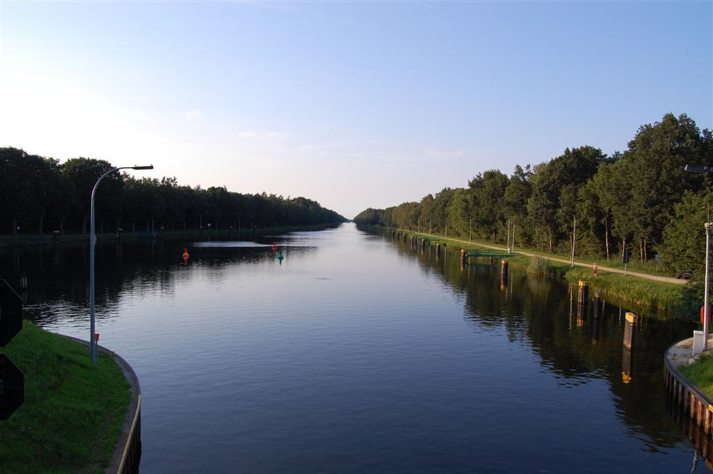 De rivier de Eems ter hoogte van de sluis Varloh.